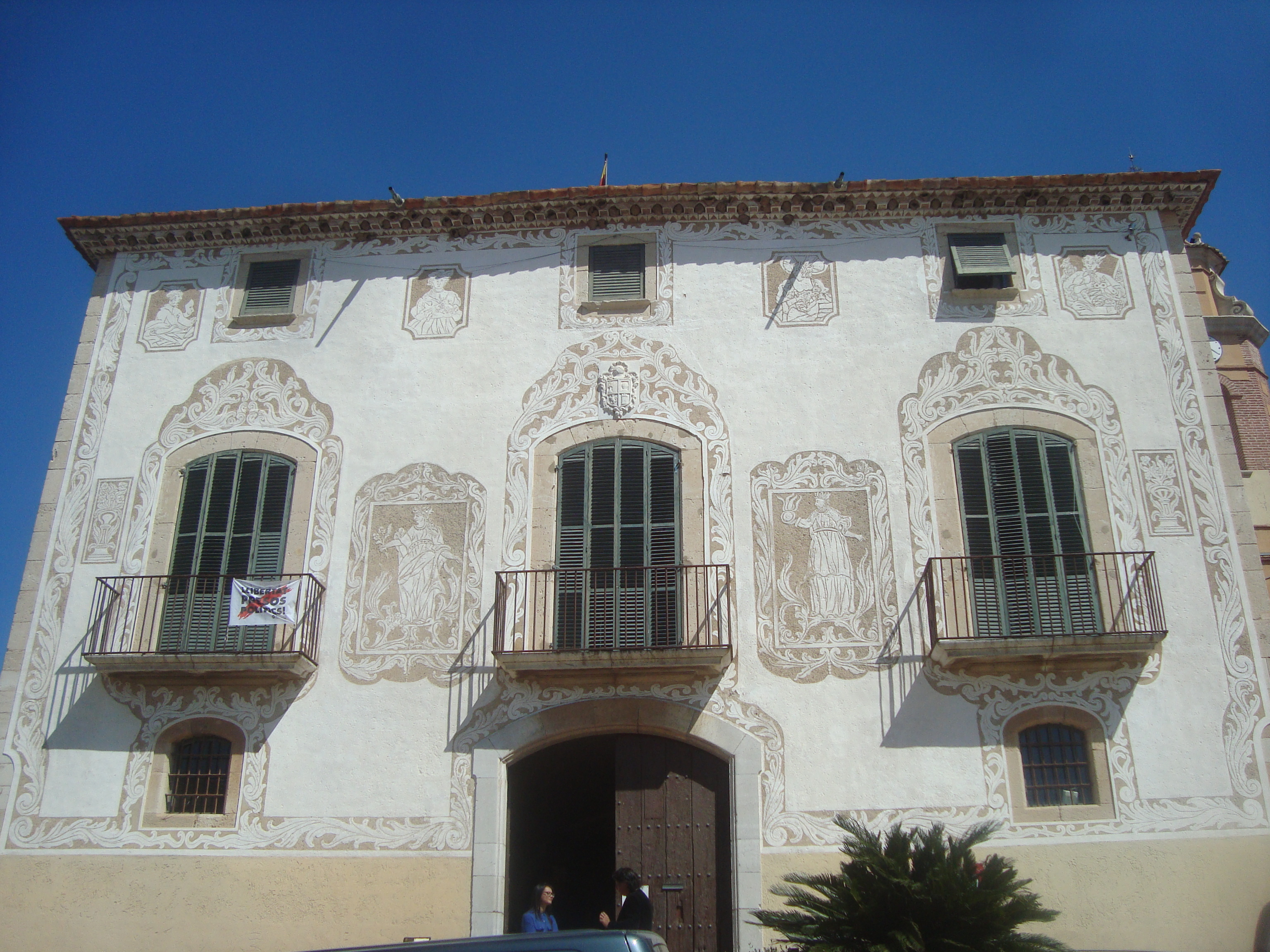 Palau-casal de los Montoliu, Ajuntament d'El Morell.